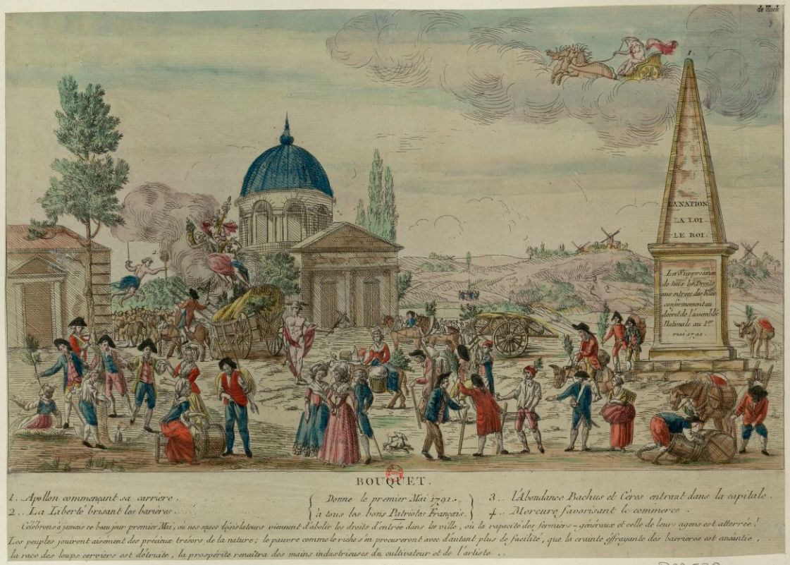 Bouquet donne le premier mai 1791 à tous les bons patriotes français : où nos sages législateurs viennent d'abolir les droits d'entrée dans la ville, où la rapacité des fermiers-généraux et celle de leurs agents est atterrée, estampe, non identifiée